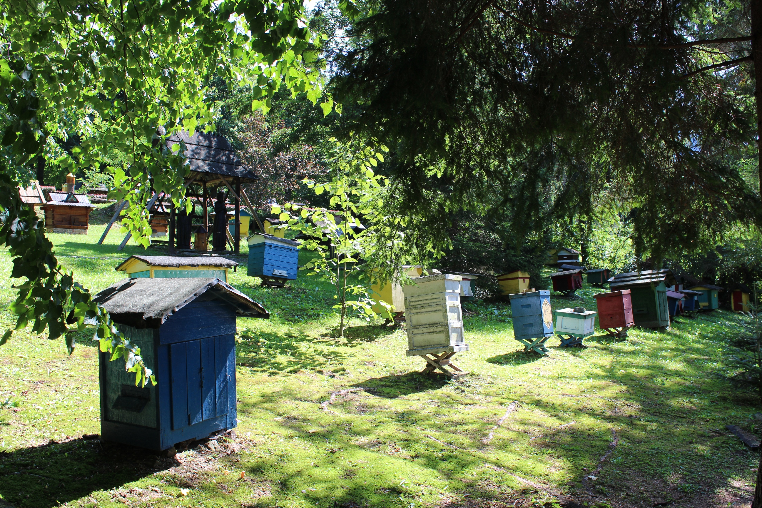 Kamianna